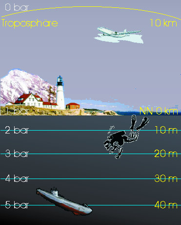 Darstellung zur Entstehung des Umgebungsdrucks beim Tauchen